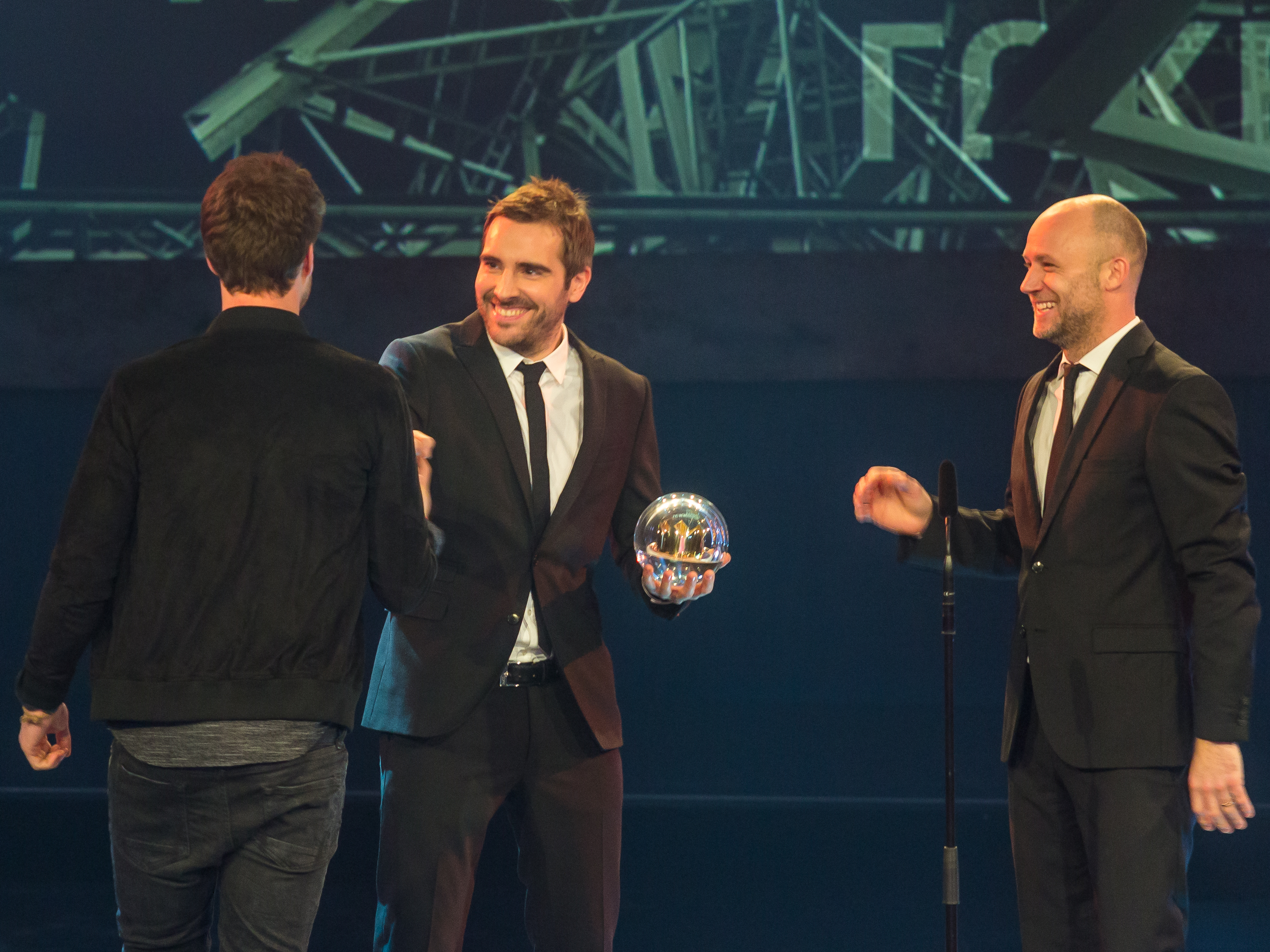 1LIVE Krone 2016 - 2015 - Show - Comedy-Krone: Luke Mockridge. Laudatoren: Tobi Schäfer und Andreas Bursche